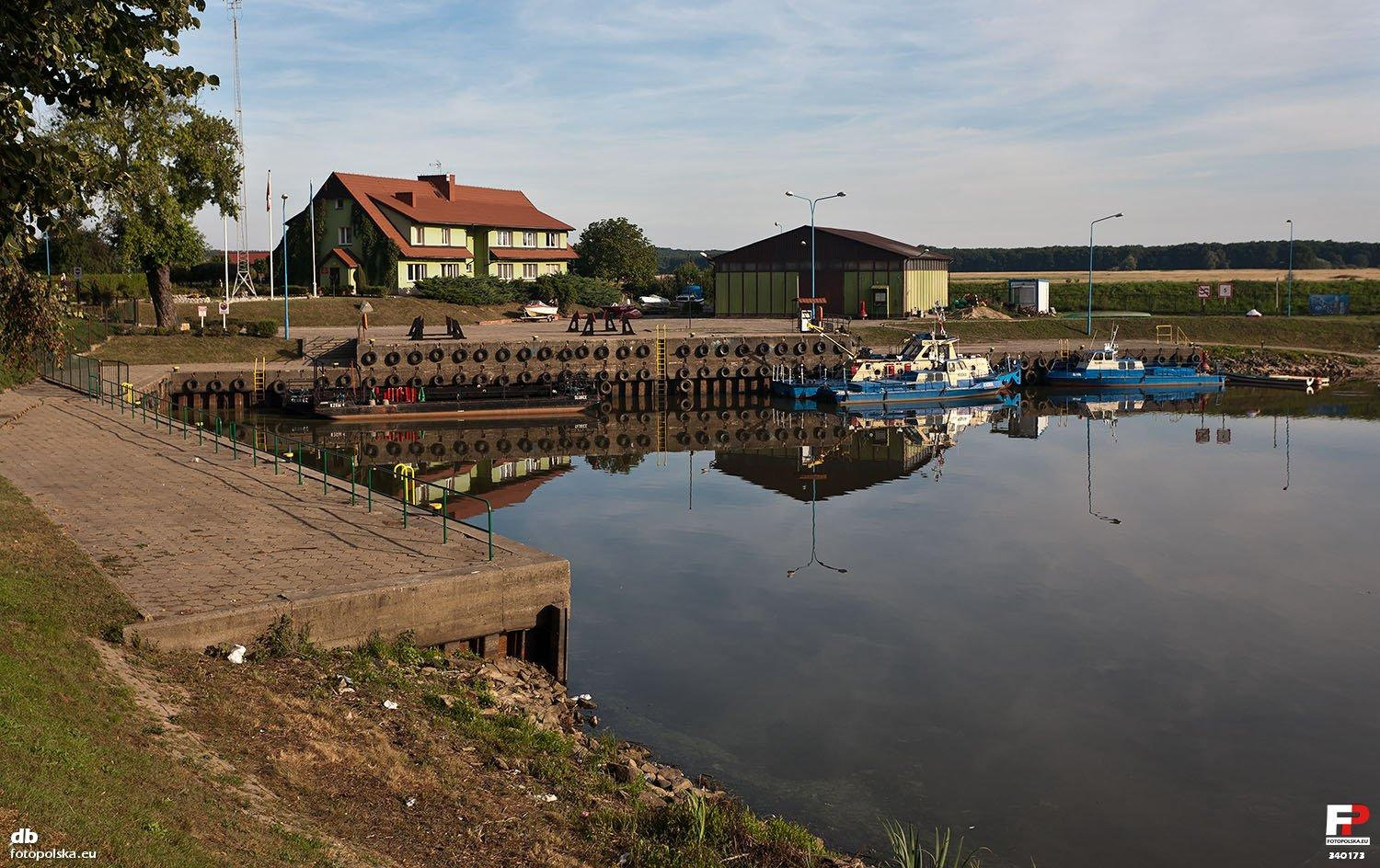 Port rzeczny Nadzór Wodny Słubice w zakolu Odry, której właściwe koryto jest w głębi, za wałem.